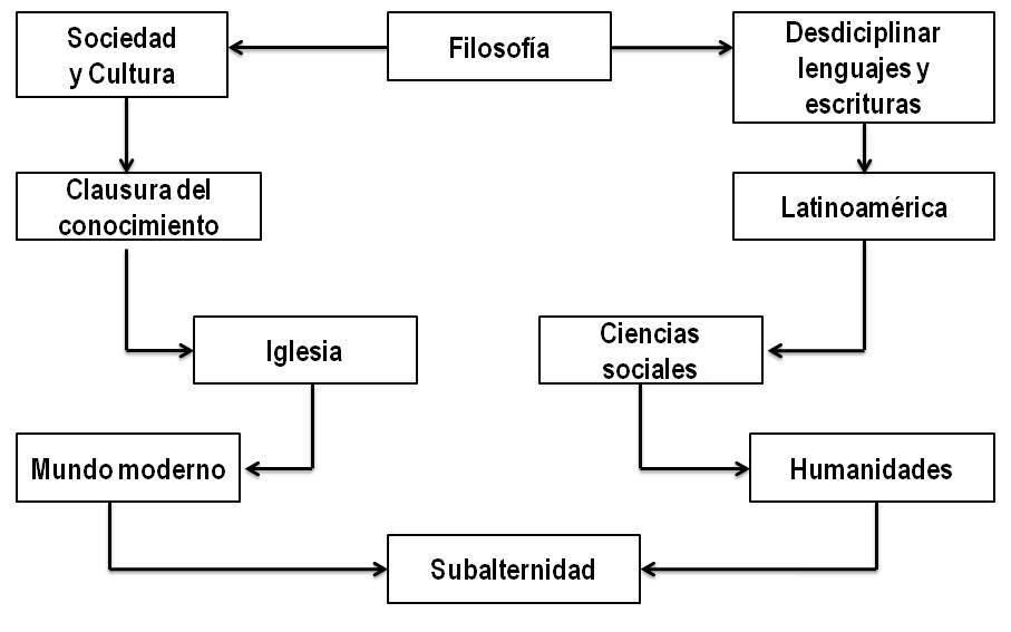 Esquema que relaciona conceptos sobre los que trabajó la Escuela de Estudios Culturales